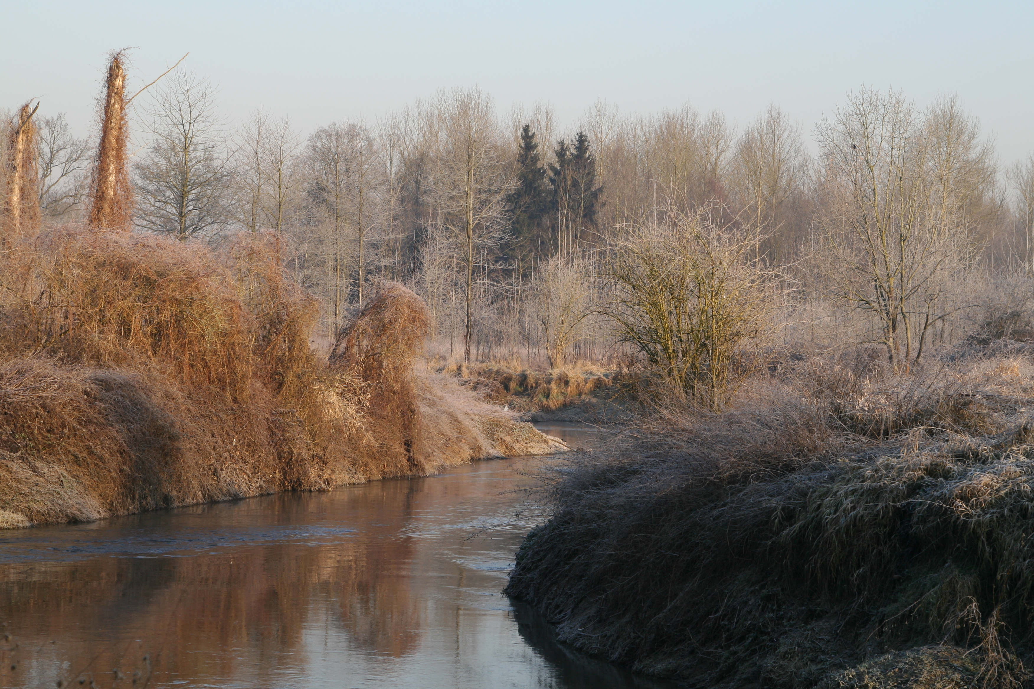 In het natuurreservaat "De Doode Bemde" in Neerijse, deelgemeente van Huldenberg